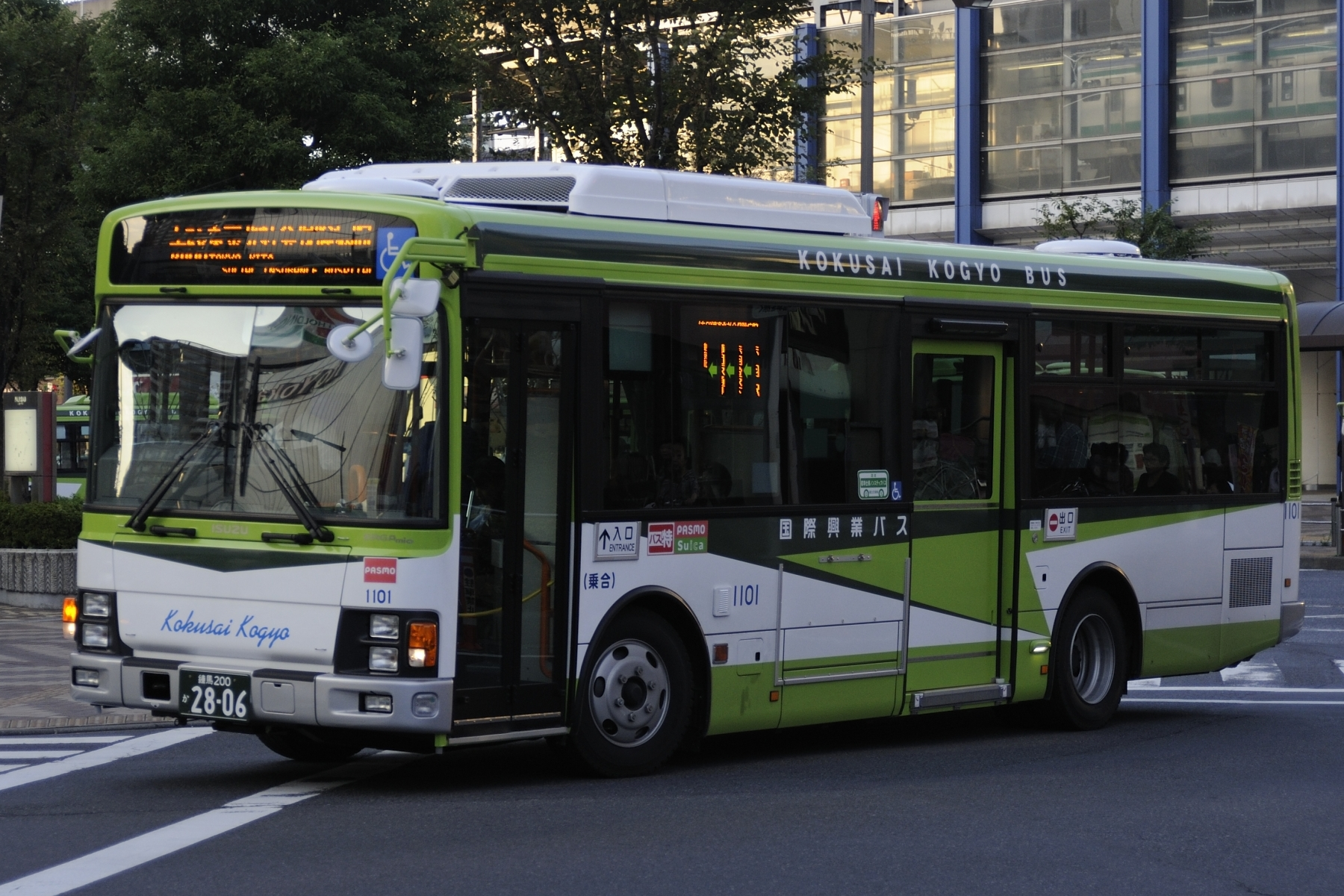 赤58として東京北医療センターへ向かう1101。専属車（735）がさいたま東へ転出後は1101が専属で充当されている。